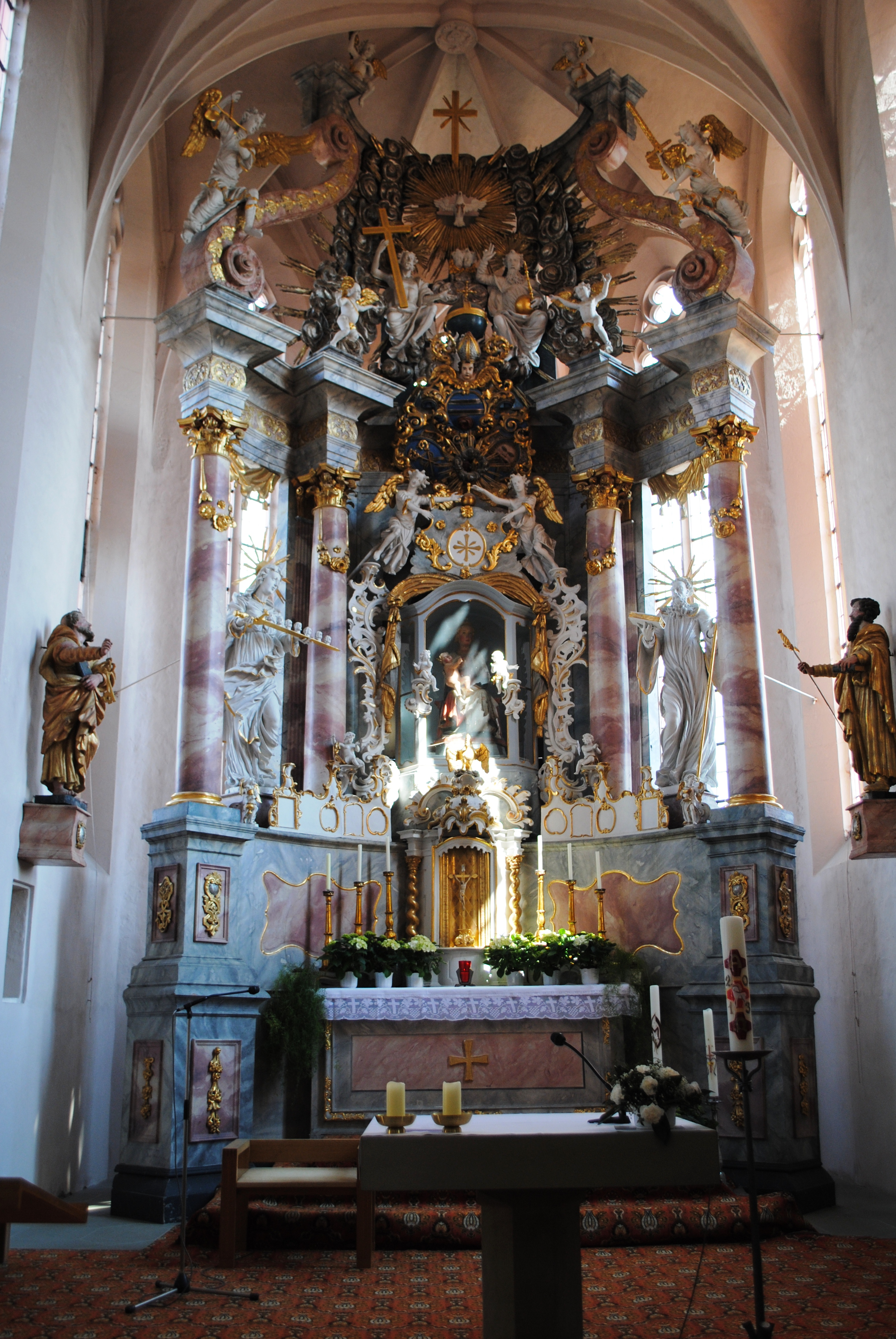 Kirche Dimbach, Volkach, Hochaltar